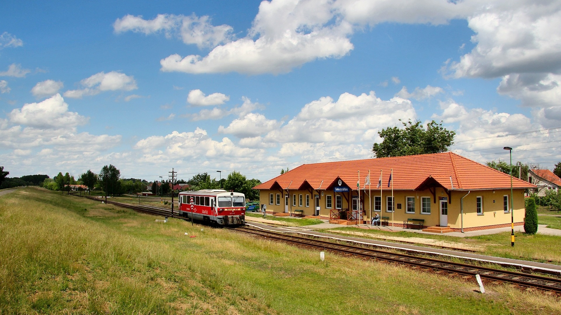 Tiborszállás vasútállomása